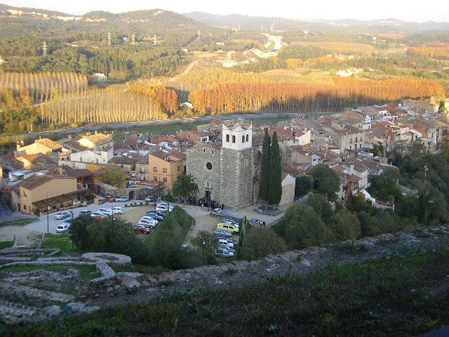 Vista de Hostalrich desde el castillo